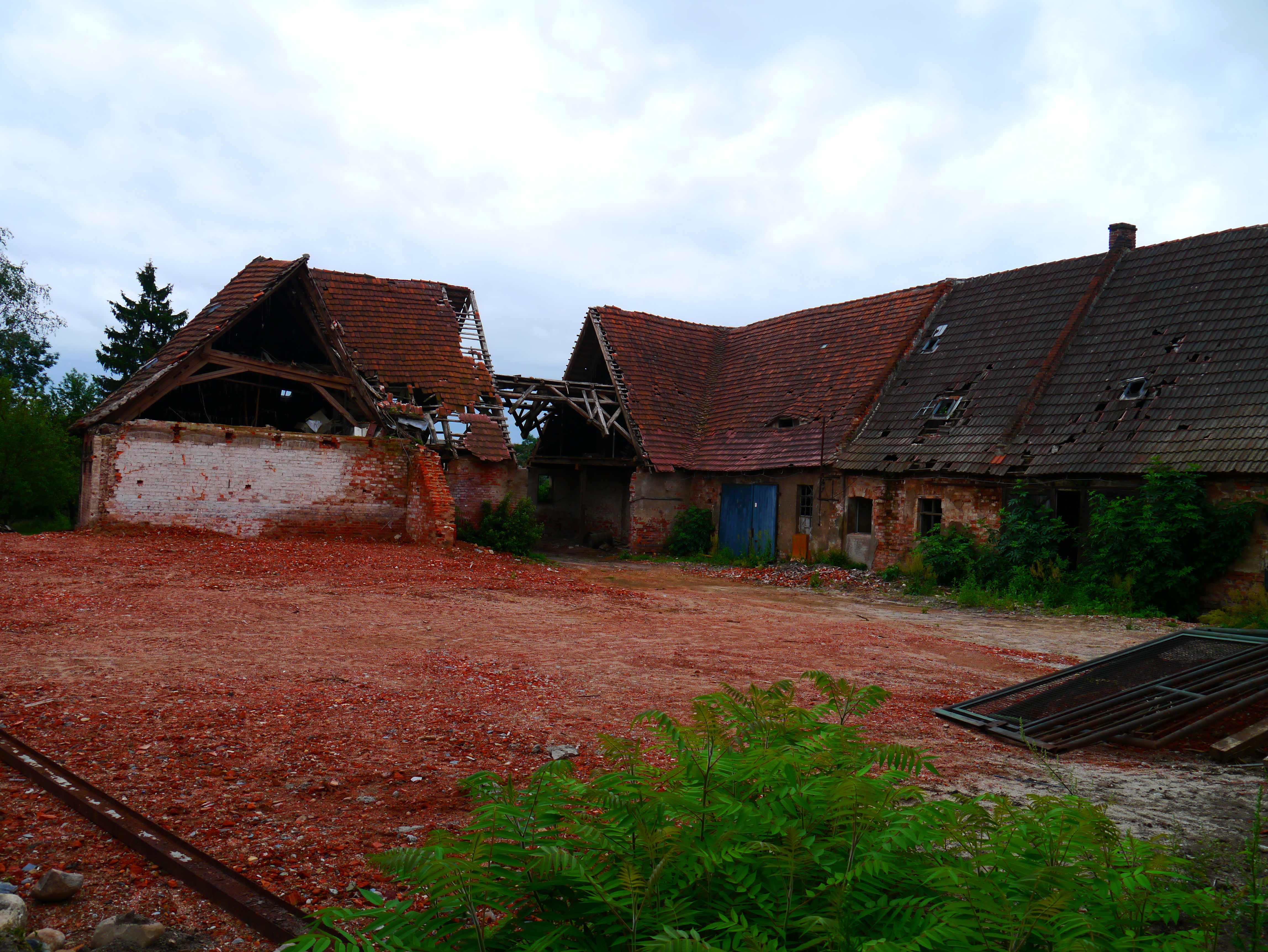 Denkmalgeschütztes Gasthaus "Rautenstock" in Doberlug-Kirchhain (OT Doberlug).